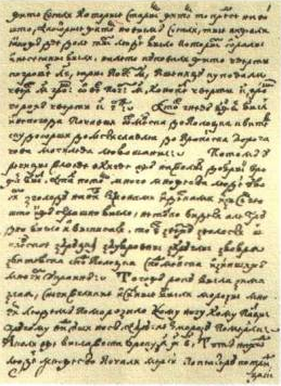 Беларуская (тарашкевіца): Баркулабаўскі летапіс, старонка рукапісу